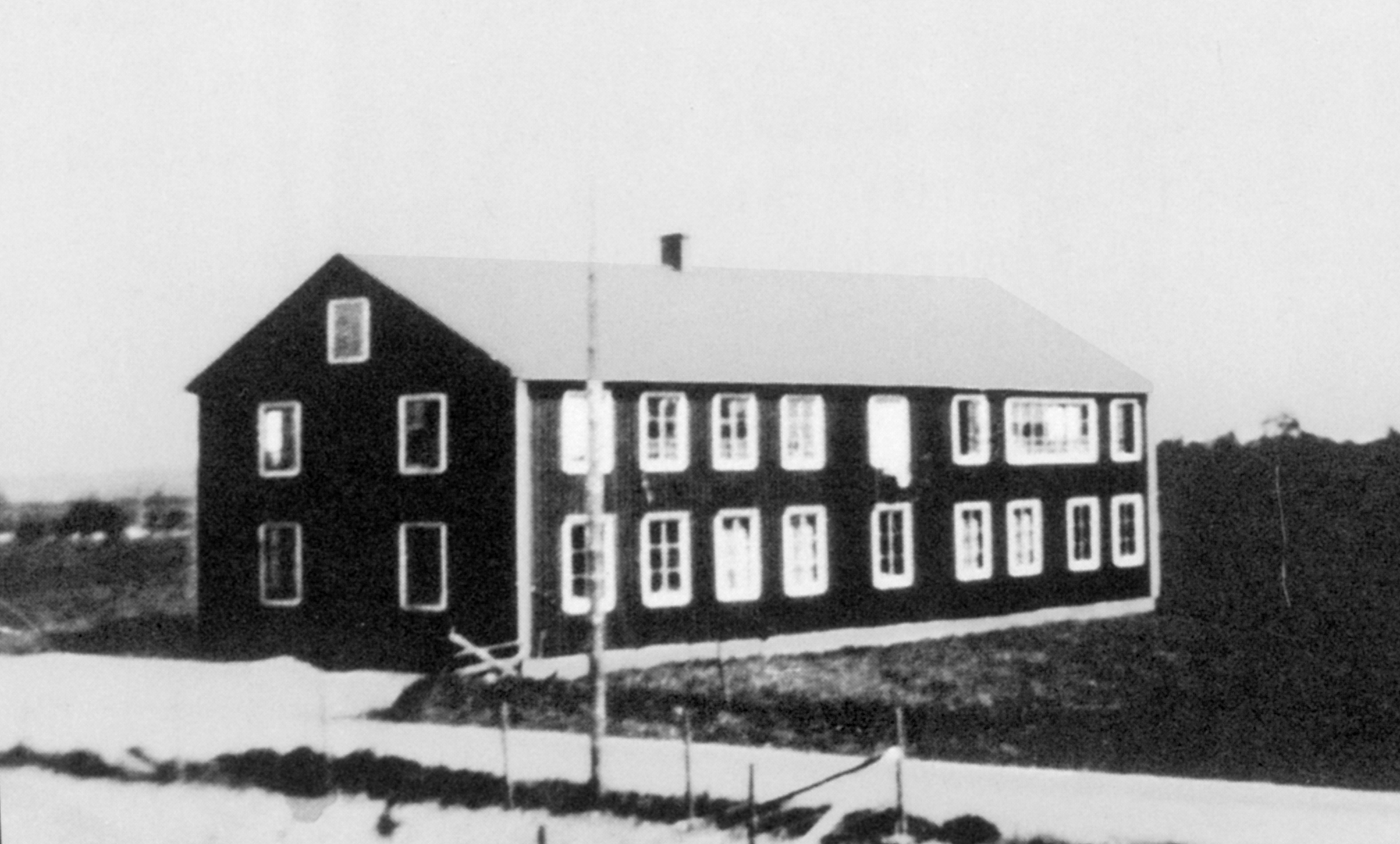 Slutarps Möbelindustri (ca 1930) i Slutarp i Falköpings kommun, Västergötland, Sverige.